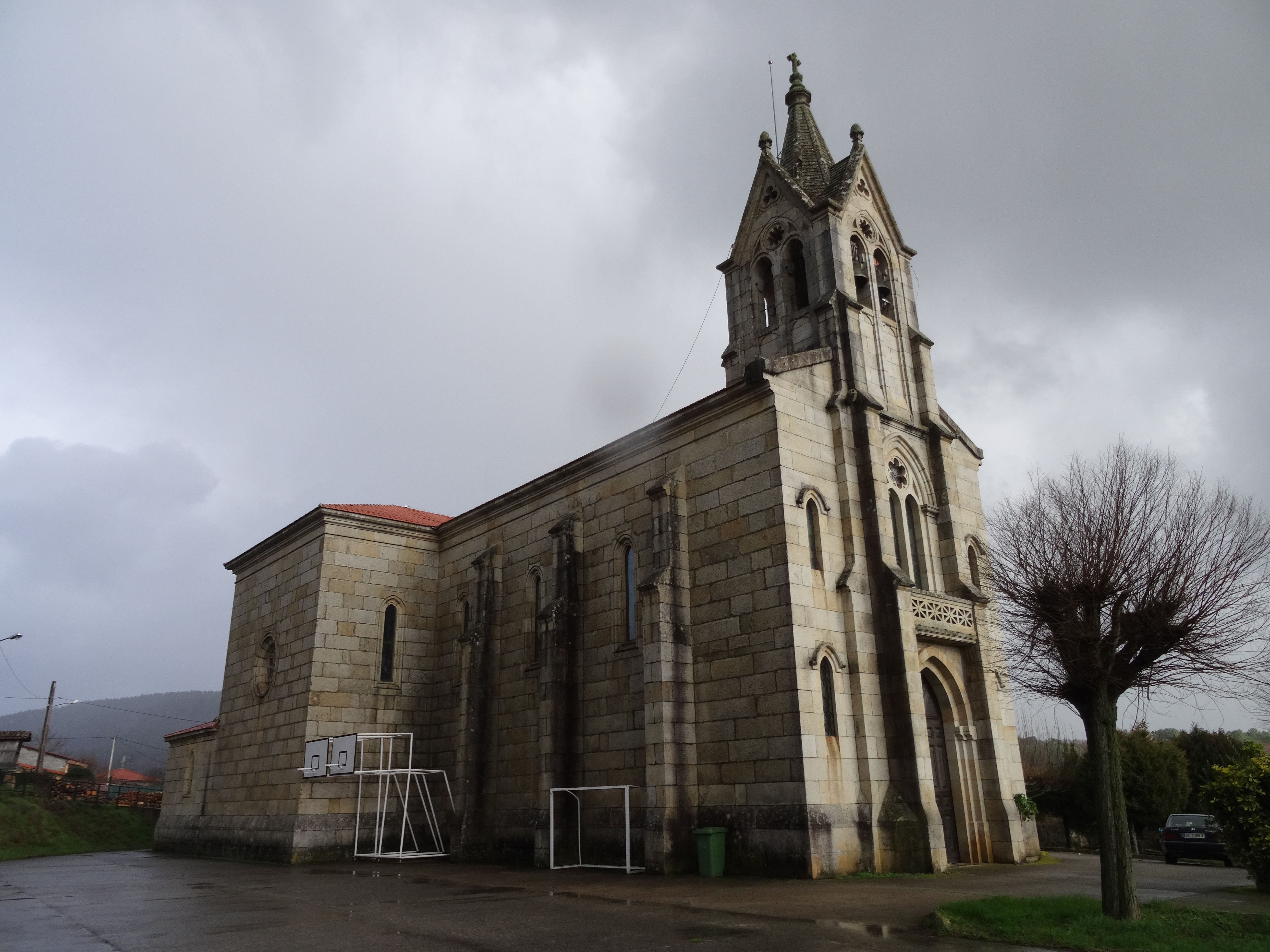 Ver título.